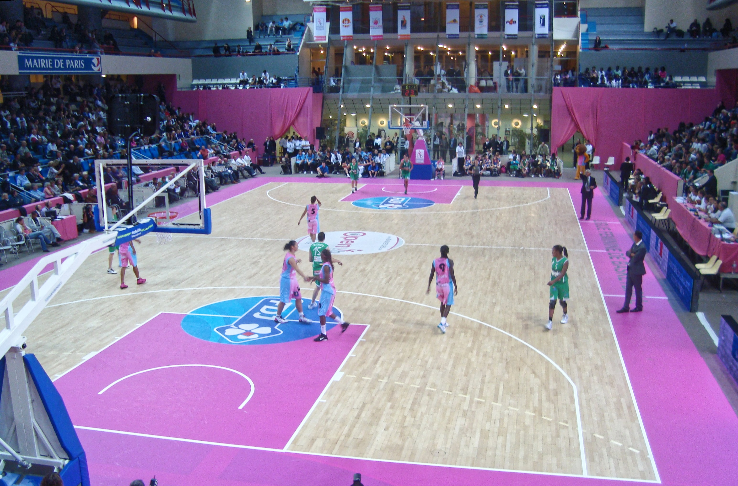 L'Open LFB d'octobre 2010 au Palais des Sports de Coubertin (matche Challes/Arras)